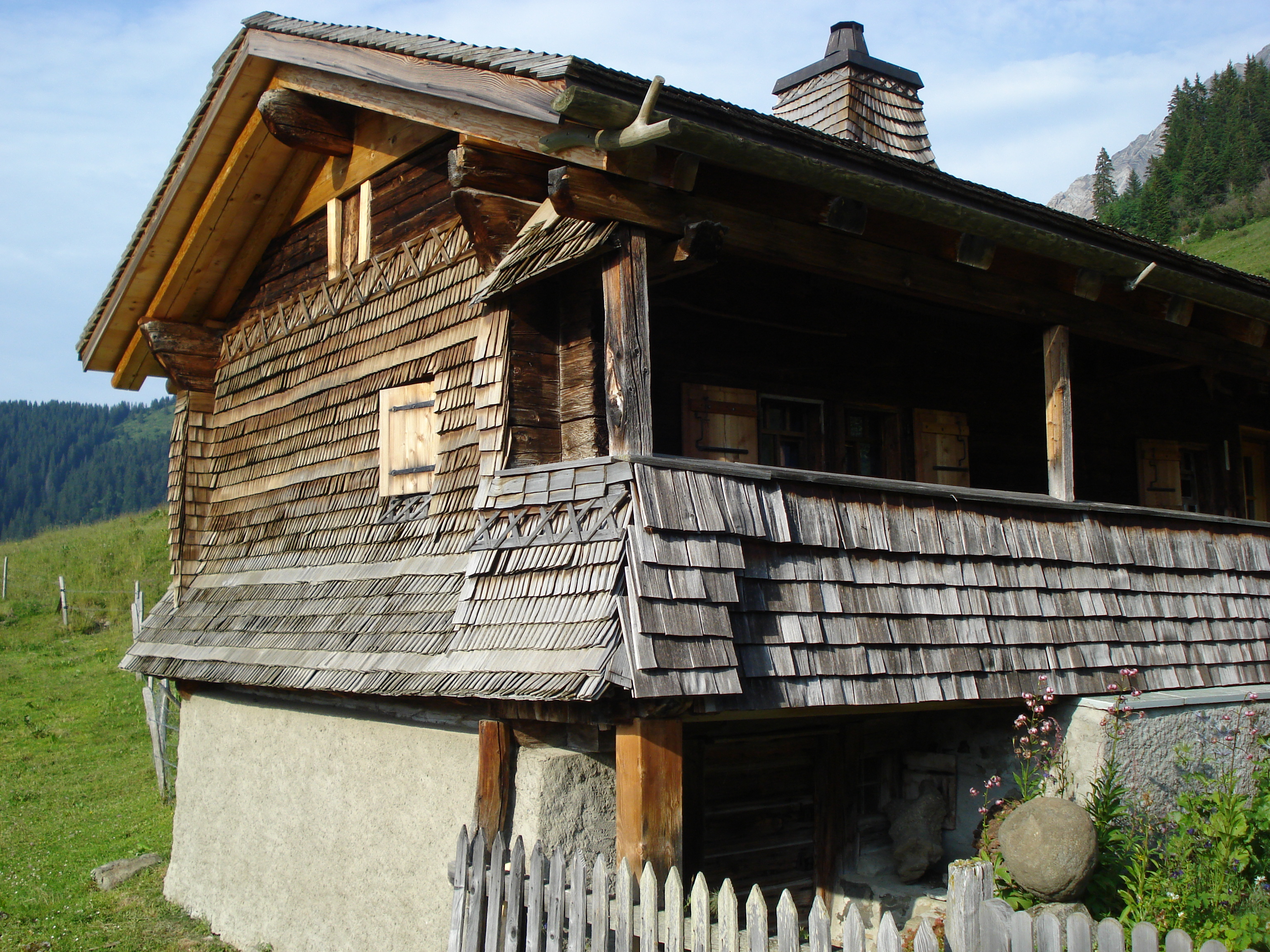 Maison couverte de tavillons située à Taveyanne près de Villars-sur-Ollon (Suisse)